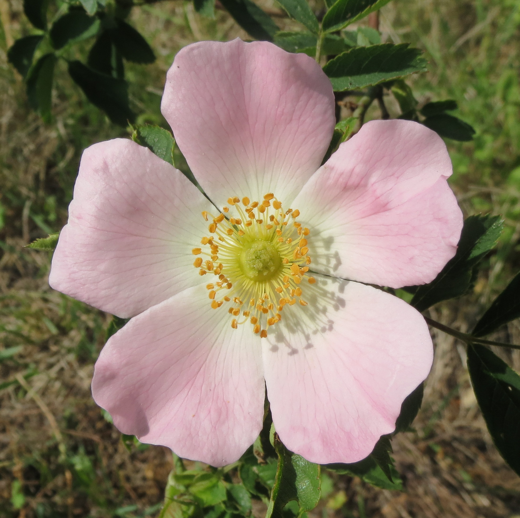 Hunds-Rose (Rosa canina) bei Reilingen